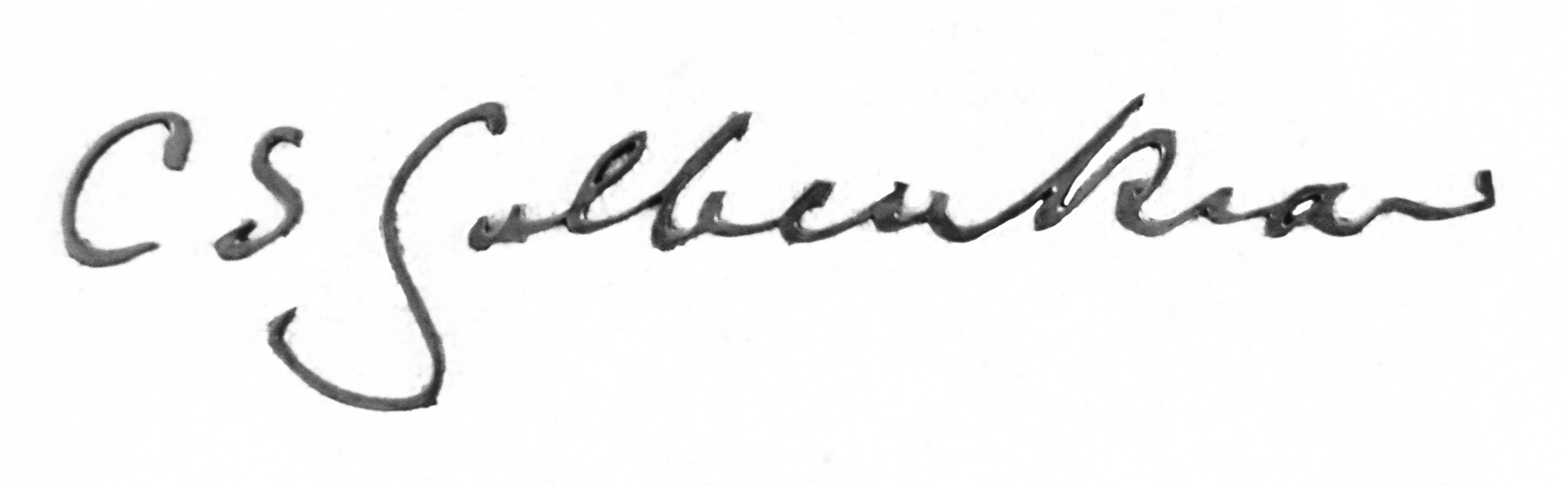 Musée Gubelkian, Lisbonne, Portugal.